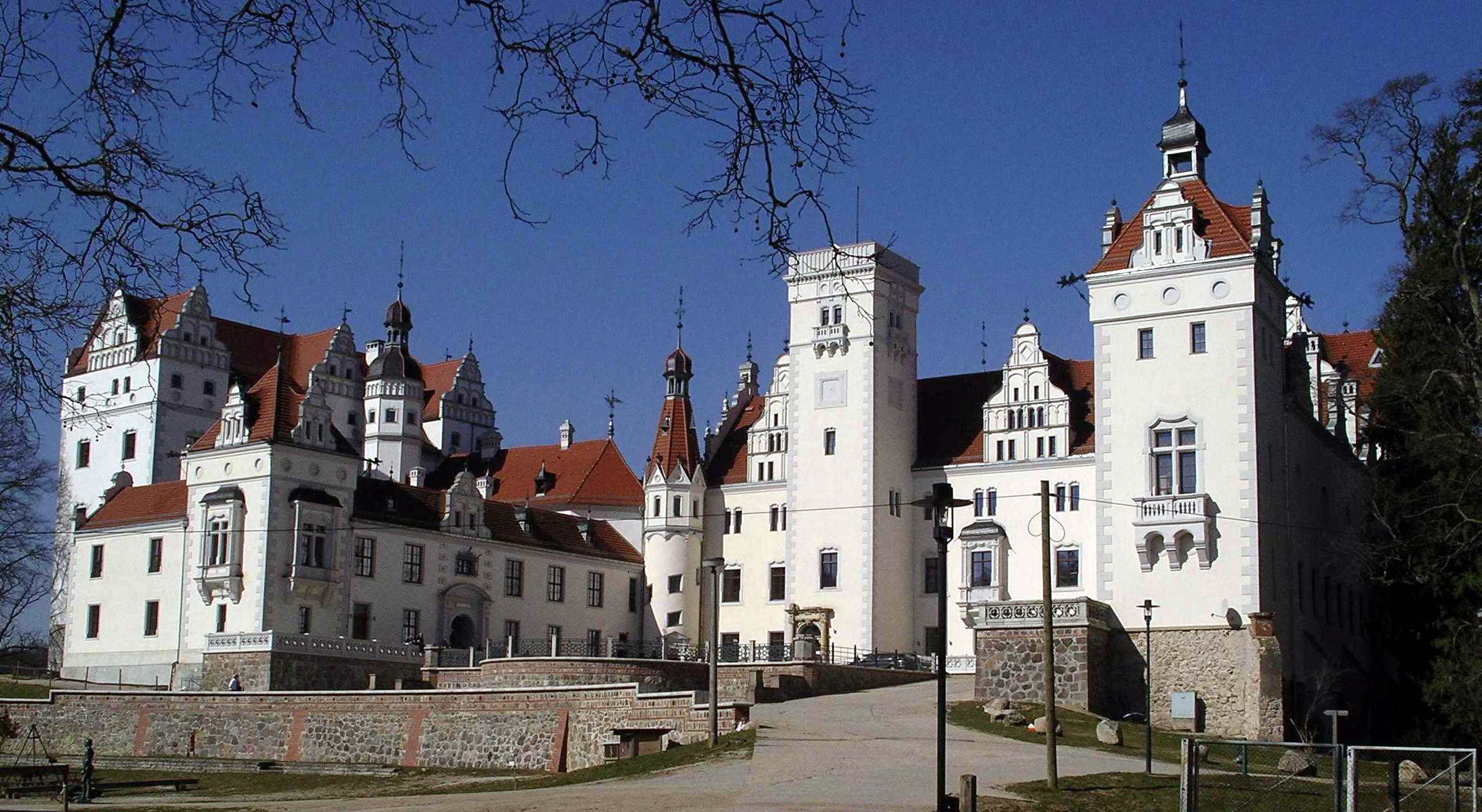 Schloss Boitzenburg in der Uckermark, Frontseite (Aufnahme von mir - Benuter:Dallu - April 2005) (engl: Boitzenburg Castle, Uckermark, Northern Germany - front side view)